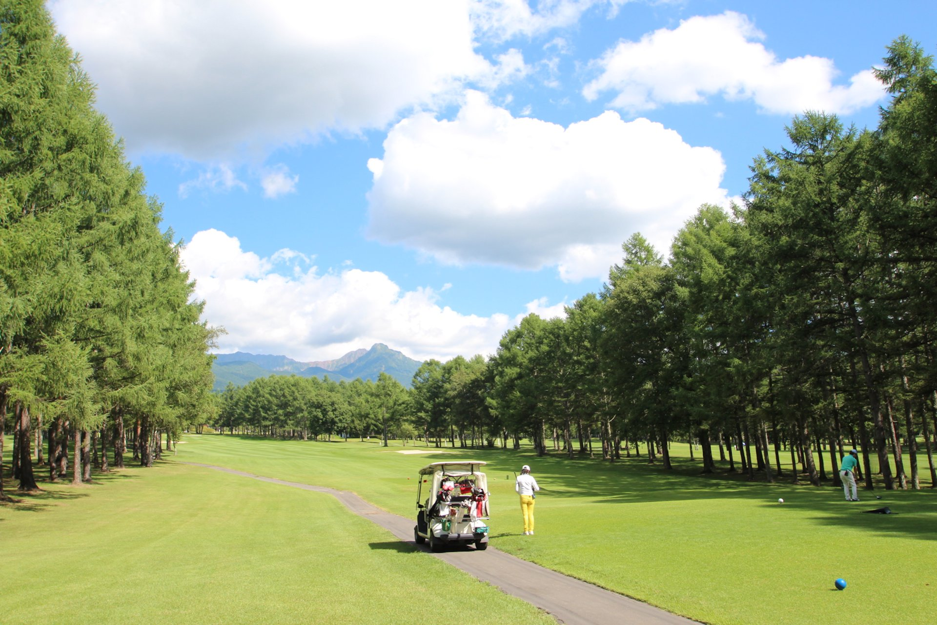 あかまつ５番